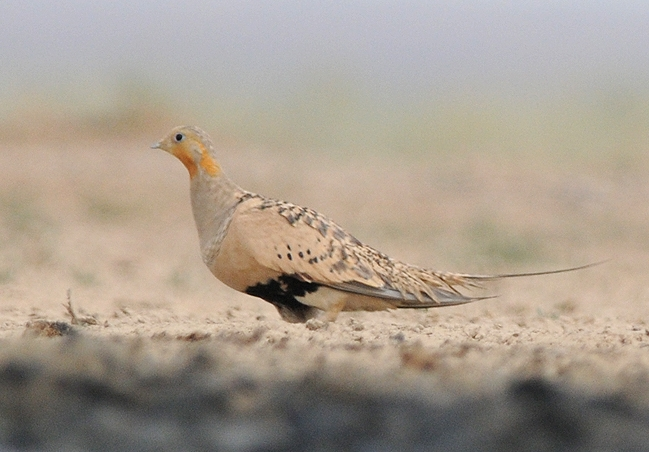 Syrrhaptes paradoxus Labkáň stepný Kolshengel